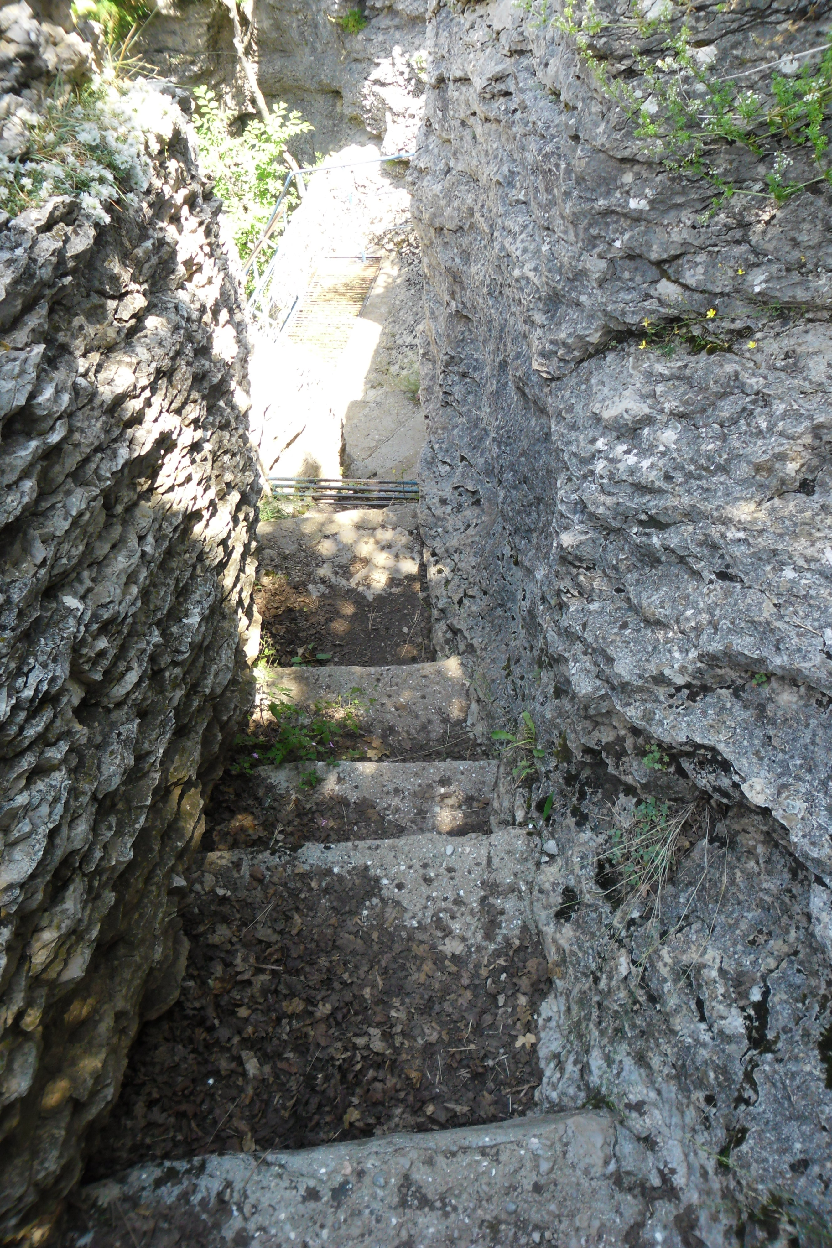 Фото